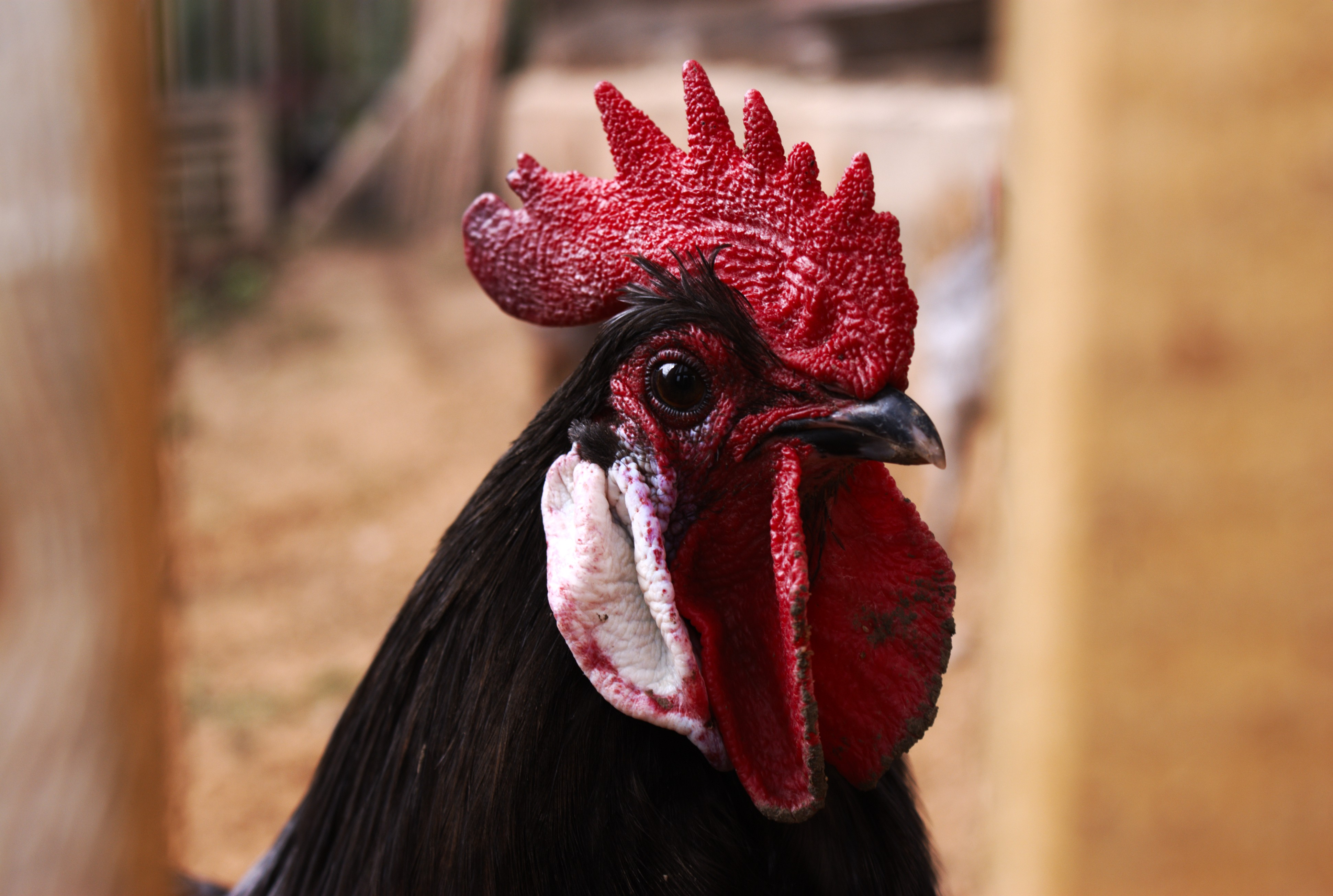 Голова андалузского петуха крупным планом.